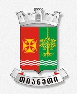 თიანეთის მუნიციპალიტეტის გერბი